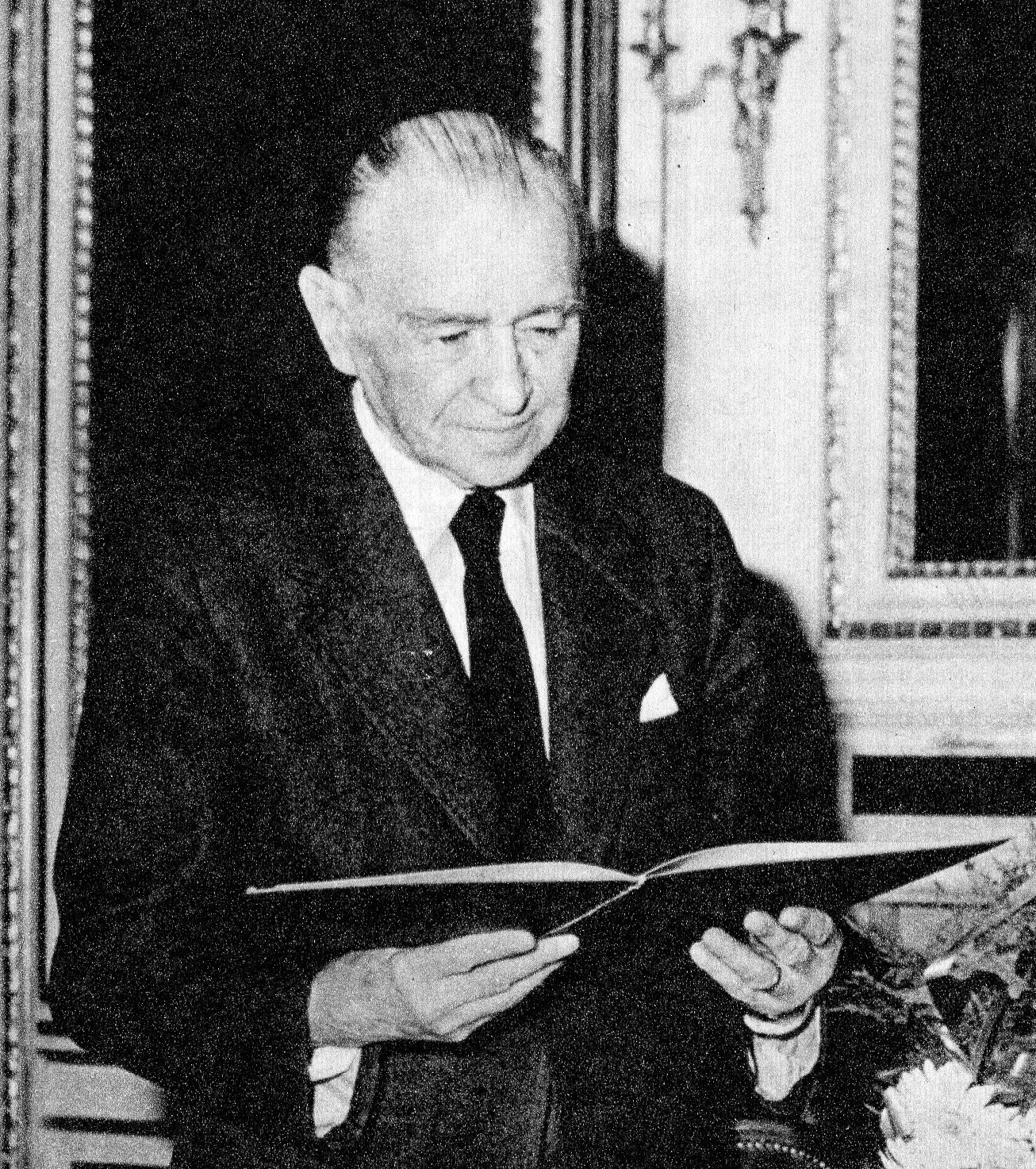 Piotr Biegański - polski architekt.